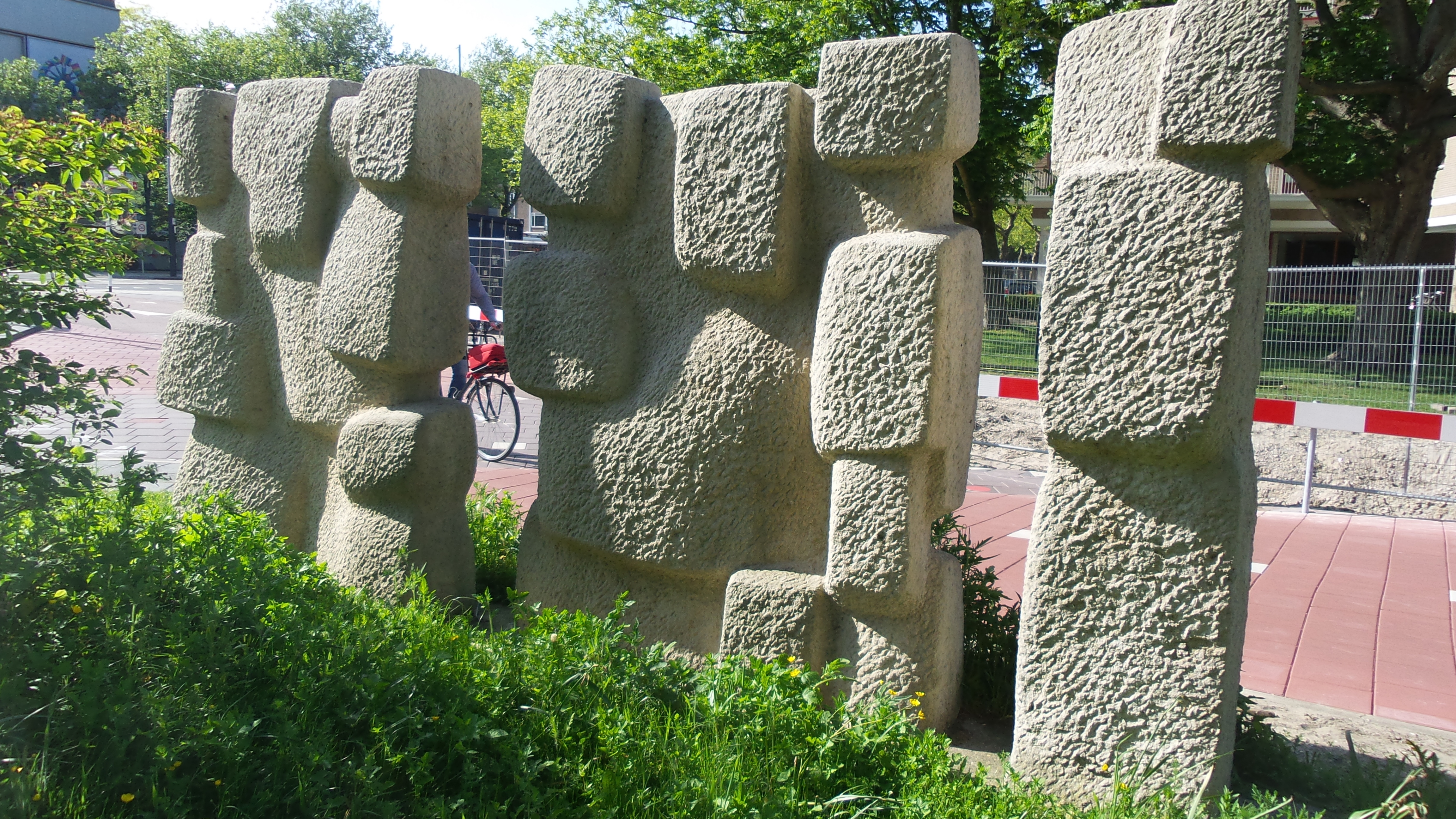 Het stenen sculptuur uit 1965 bestaat uit drie losse vormen die zijn opgebouwd uit gestapelde blokken en staat aan de prinses Irenestraat in Amsterdam.